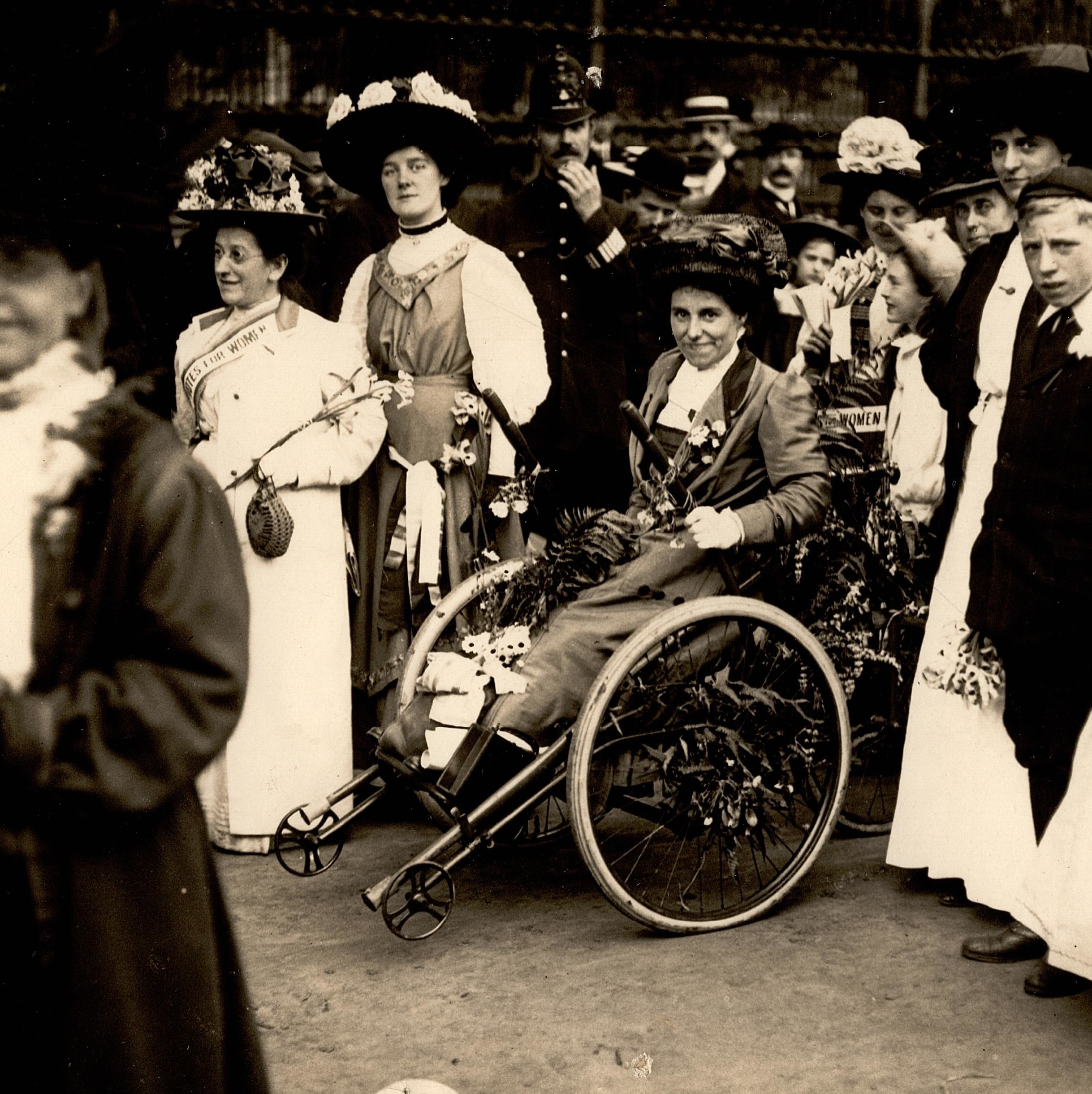 7ewd j 55